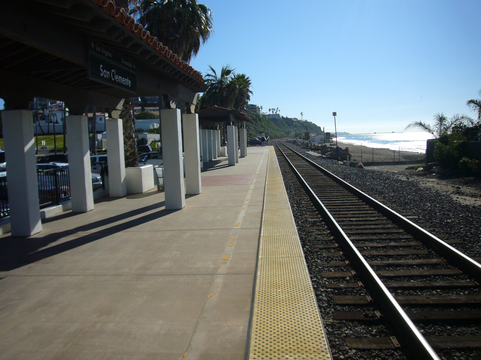 San Clemente pier in distance.